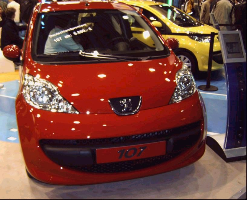 peugeot 107